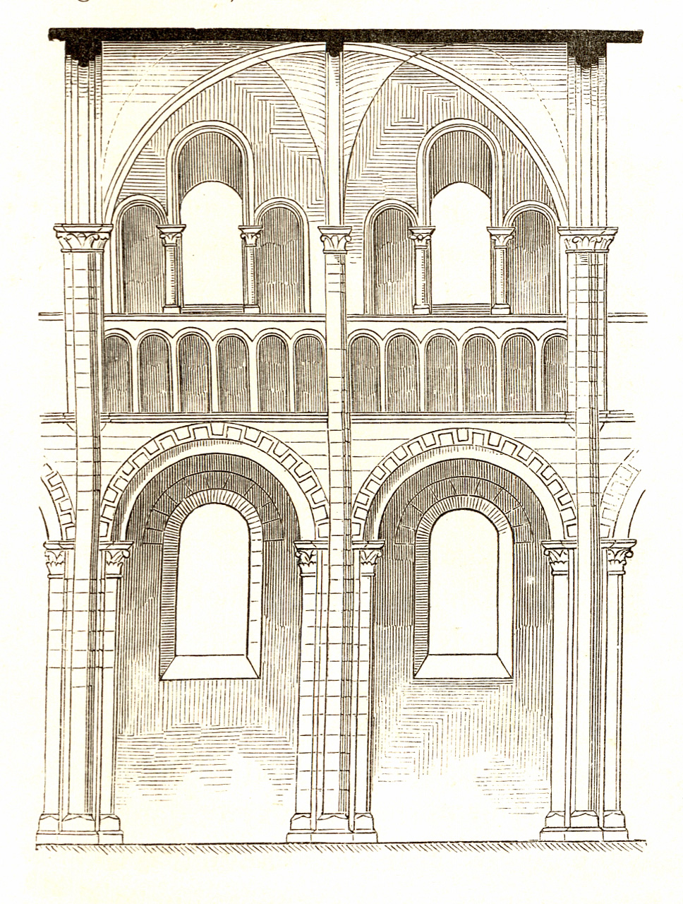 Zeichnung aus dem Jahrbuch der kaiserl. königl. Central-Commission zur Erforschung und Erhaltung der Baudenkmale III. 1859. 1-104. Zuordnung entsprechend Dateinamen August Essenwein (1831–1892) DescriptionGerman architect and writerDate of birth/death2 November 183113 October 1892Location of birth/deathKarlsruheNurembergAuthority control VIAF: 51804595 ISNI: 0000 0001 1062 3760 ULAN: 500014044 LCCN: n86016586 GND: 119022192 WorldCat